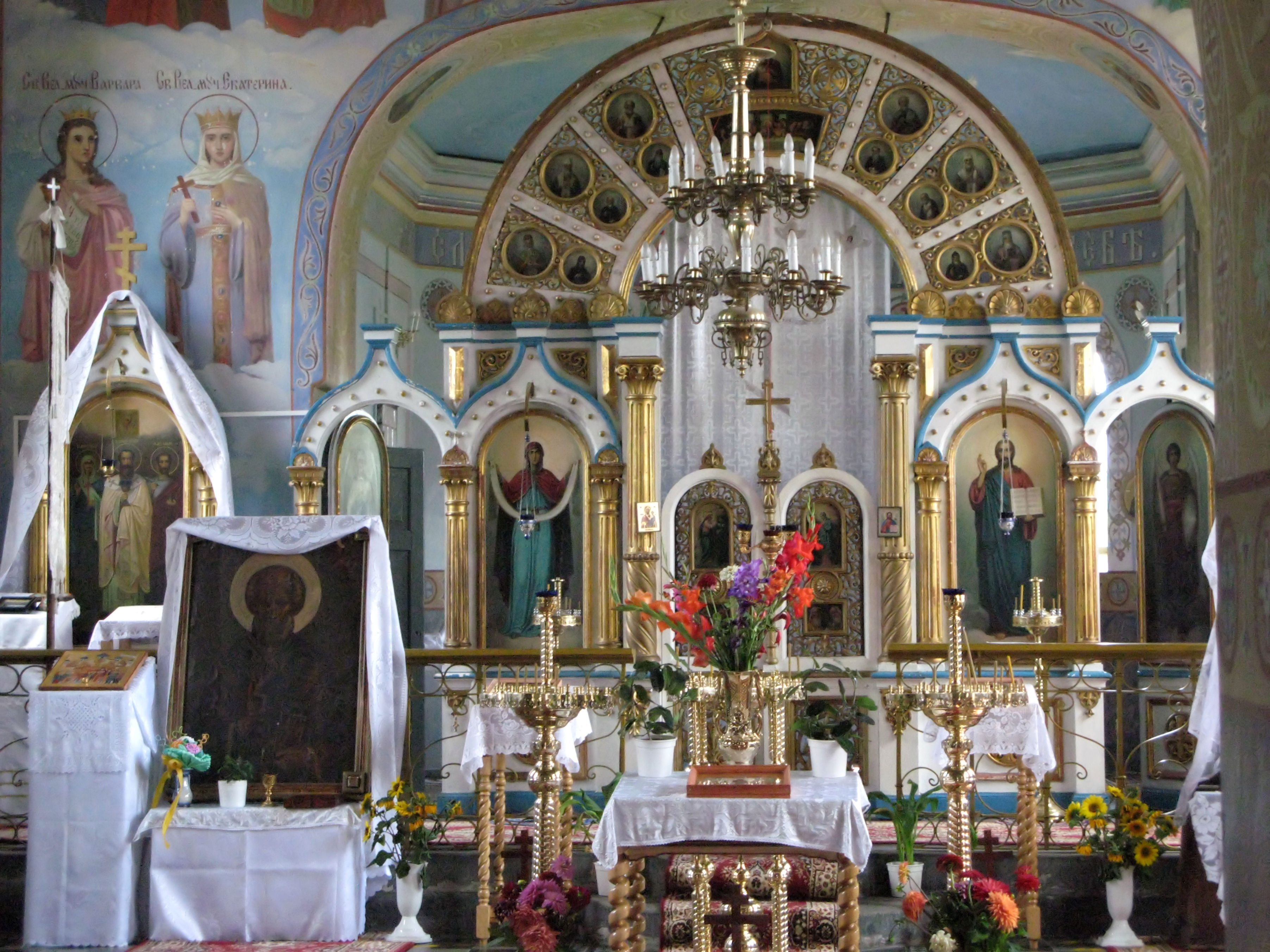 Cerkiew prawosławna fil. p.w. Wniebowzięcia NMP ob. p.w. Opieki Matki Boskiej (XIX/XX) Sławatycze, gmina Sławatycze 12.1988.